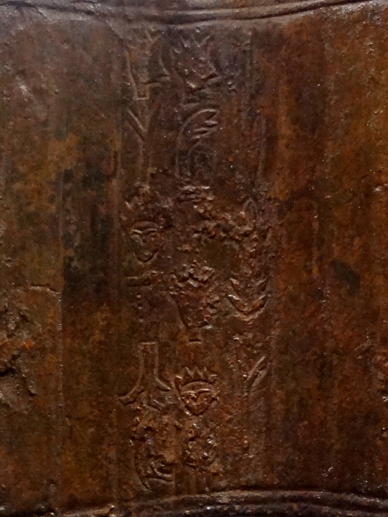 Bronzene Doppelaxt mit eingravierter Inschrift (wahrscheinlich aus dem 17. Jahrhundert v. Chr.) aus Arkalochori, ausgestellt im Archäologischen Museum Iraklio, Kreta, Griechenland